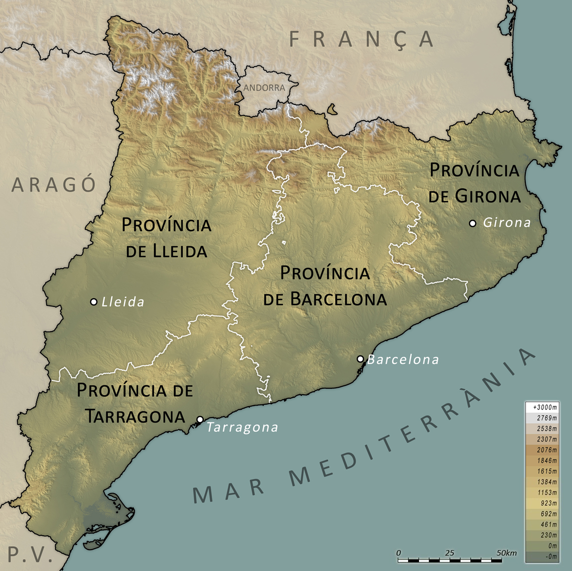 Mapa provincial de Catalunya. Per Hansen